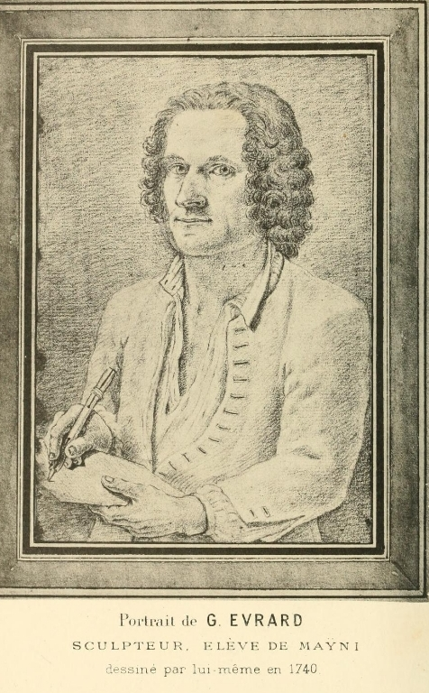 Portrait de Guillaume Évrard, sculpteur liégeois (1709-1793), dessiné par lui-même en 1740.